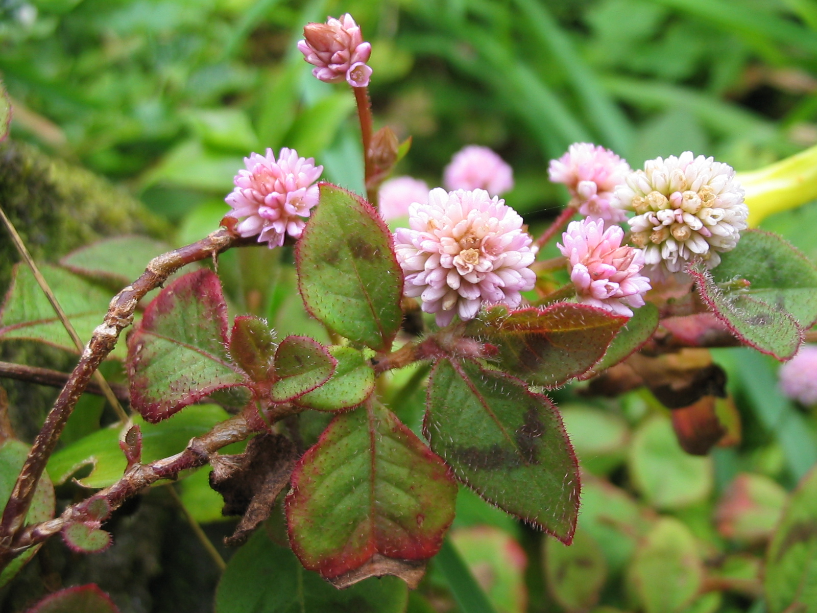 Köpfchen-Knöterich (Persicaria capitata)